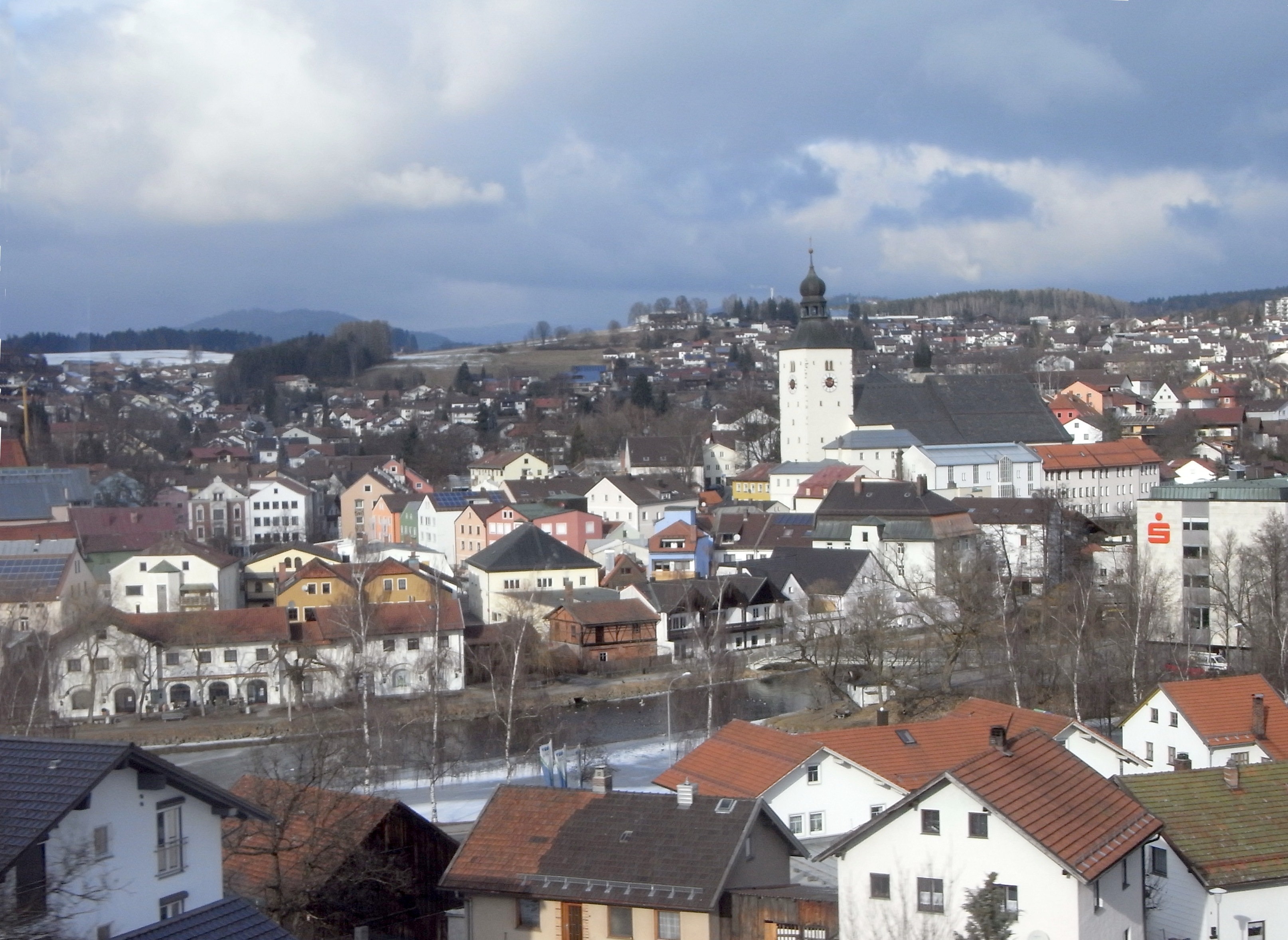 Stadt Regen mit Pfarrkirche St. Michael